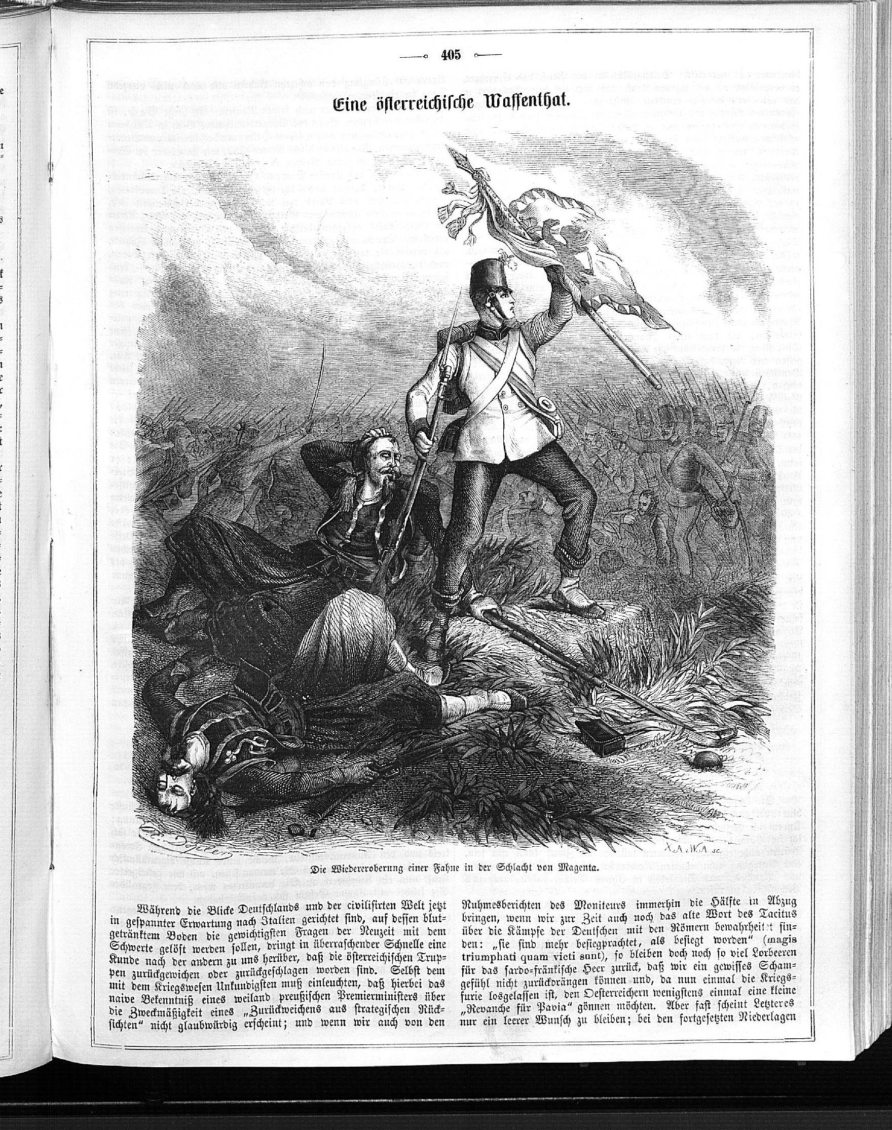 Seite 405 aus "Die Gartenlaube". Page 405 from journal Die Gartenlaube, 1859. Extracted image (if any): File:Die Gartenlaube (1859) b 405.jpg - hi res, ~2.5 MB.